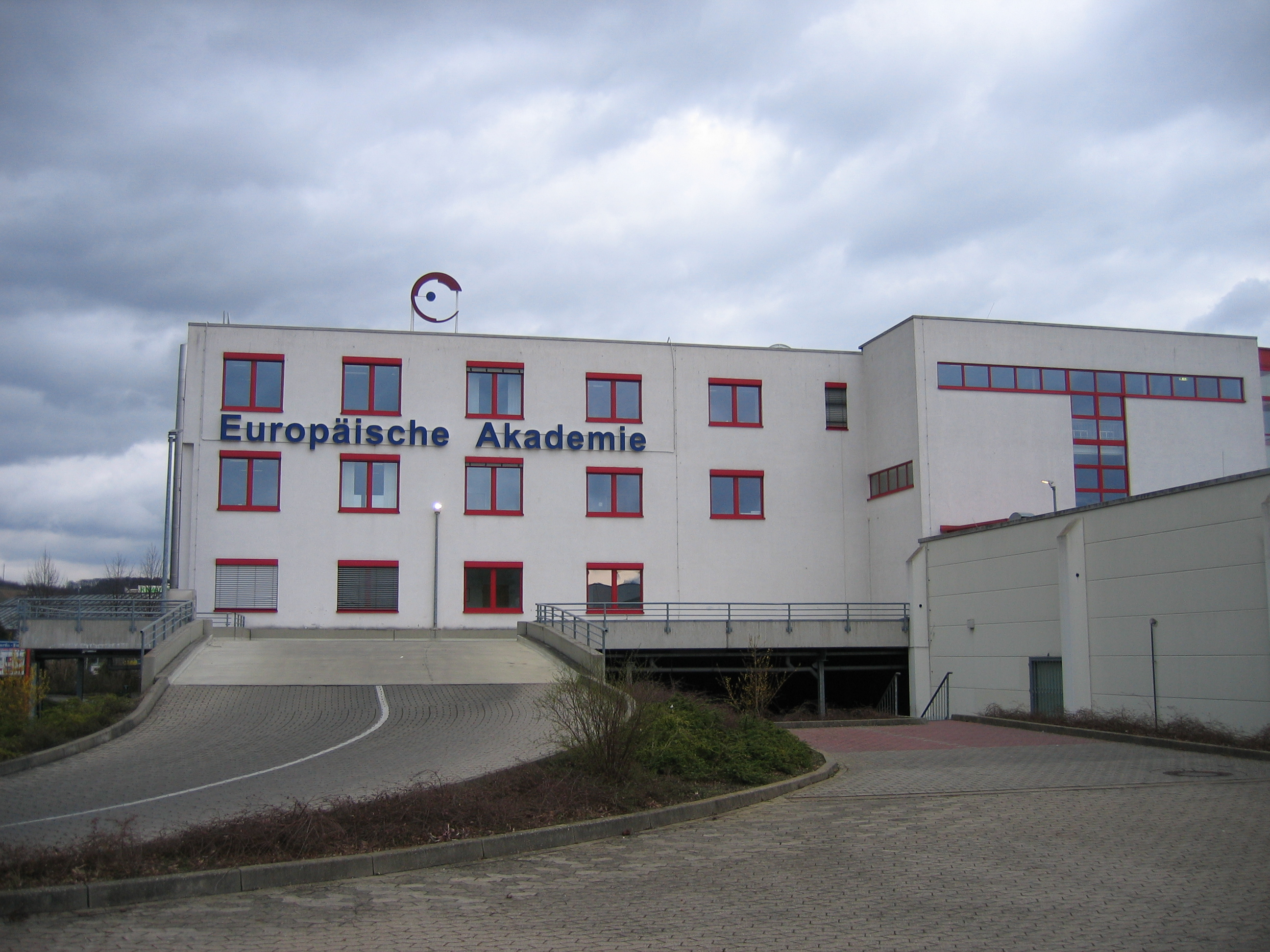 Das Gebäude der Europäischen Akademie Bad Neuenahr-Ahrweiler